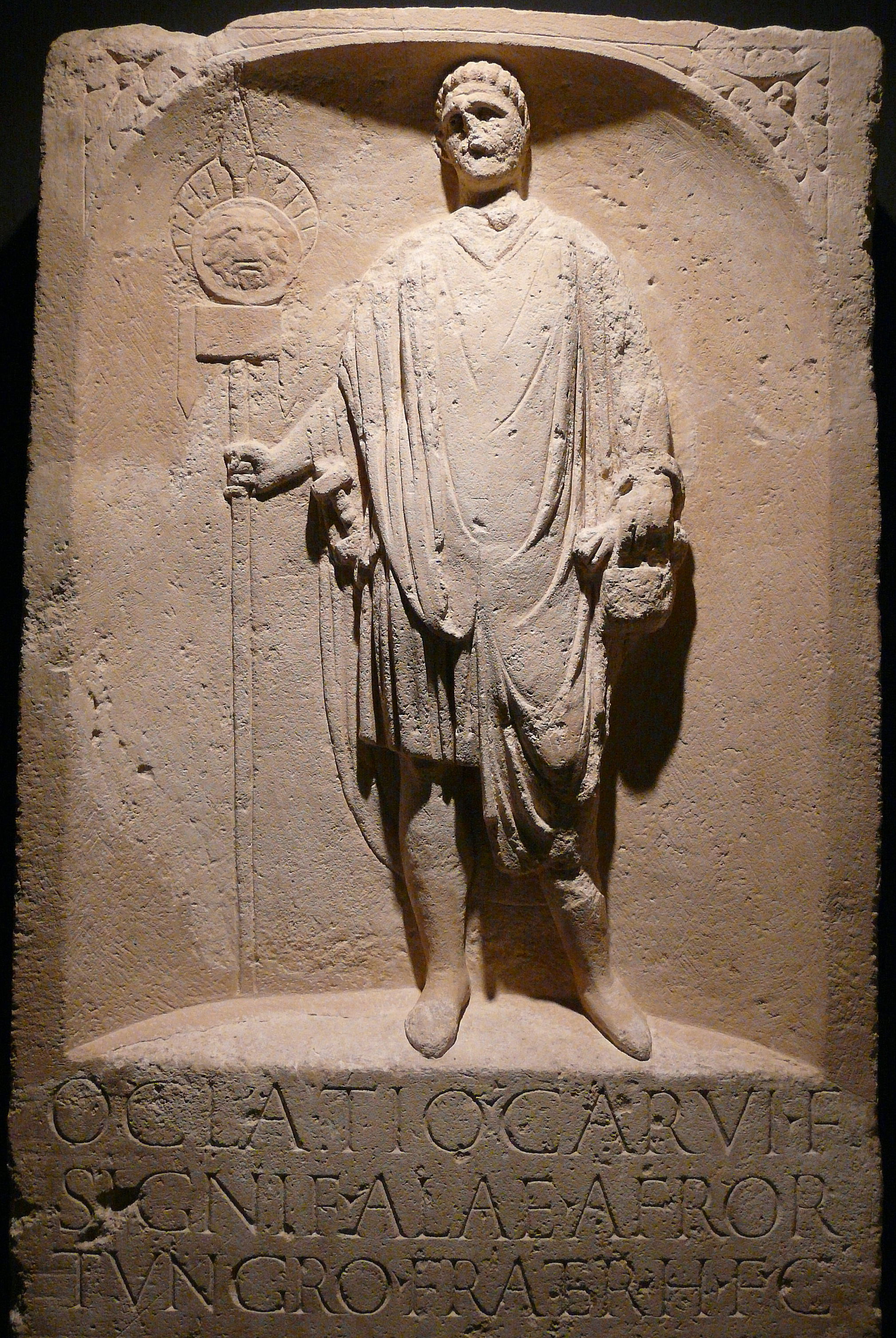 Grabstein des Oclatius aus Novaesium (oberer Teil), Clemens-Sels-Museum, Neuss